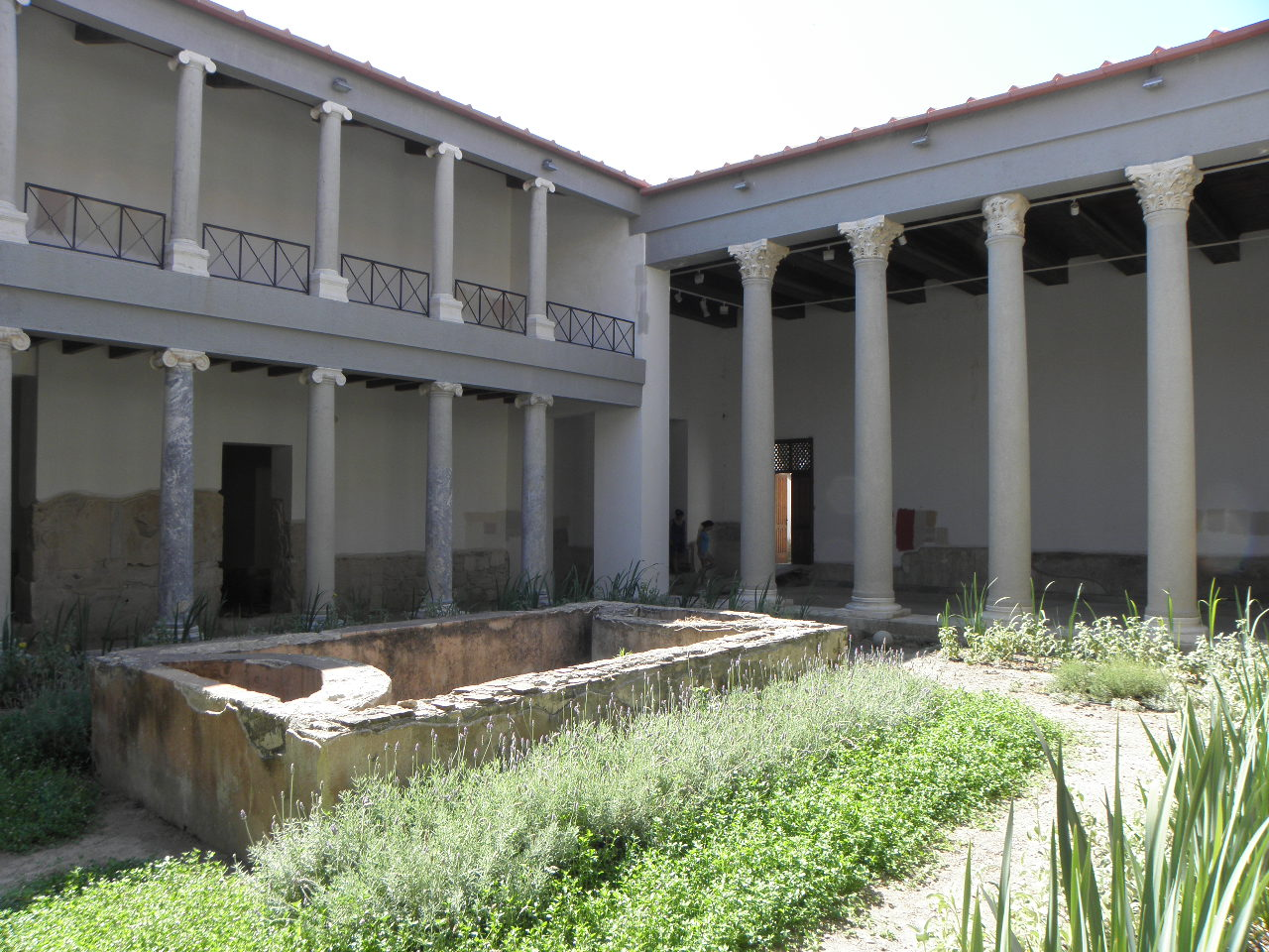 Casa Romana; Kos (GR)